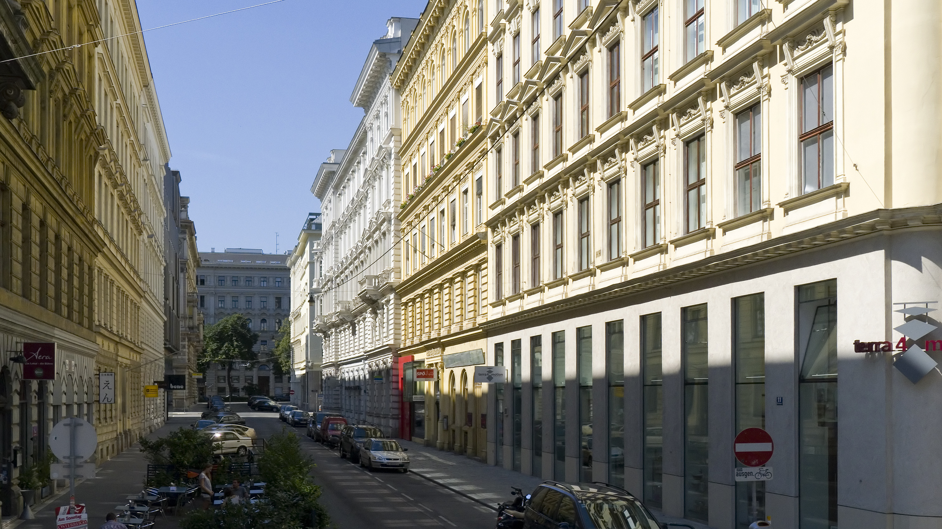 Werdertorgasse in Wien 1 bei der Gonzagagasse Richtung Südwesten